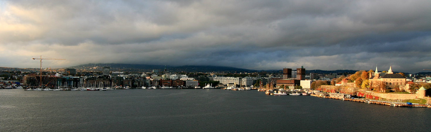 Pipervika, Oslo, Norway.